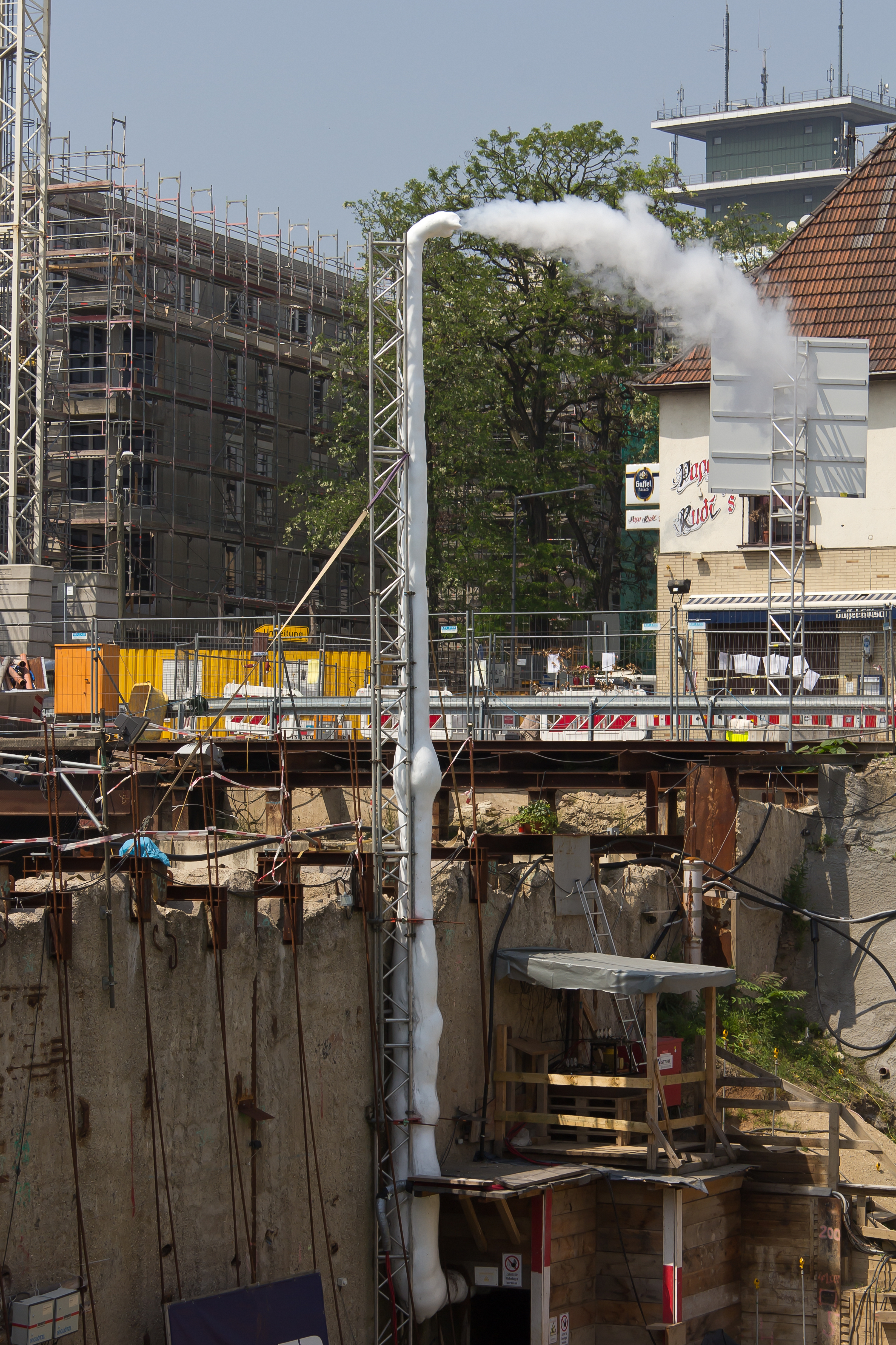 Historisches Archiv der Stadt Köln - Verfüllung der Bergungsbaugrube als vorbereitende Maßnahme zur Aushebung des Besichtungsbauwerkes